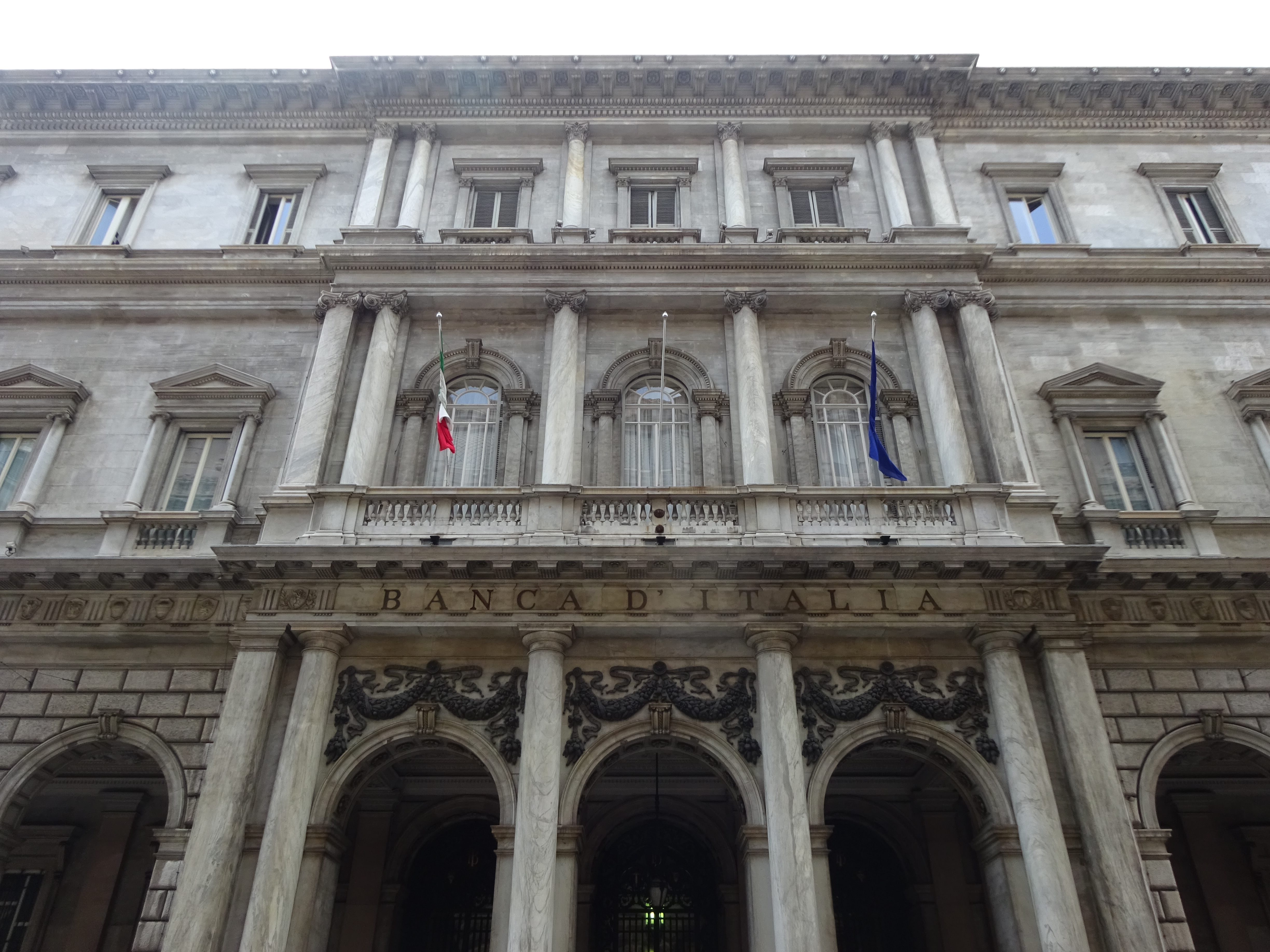 La facciata del palazzo della Banca d'Italia a Genova